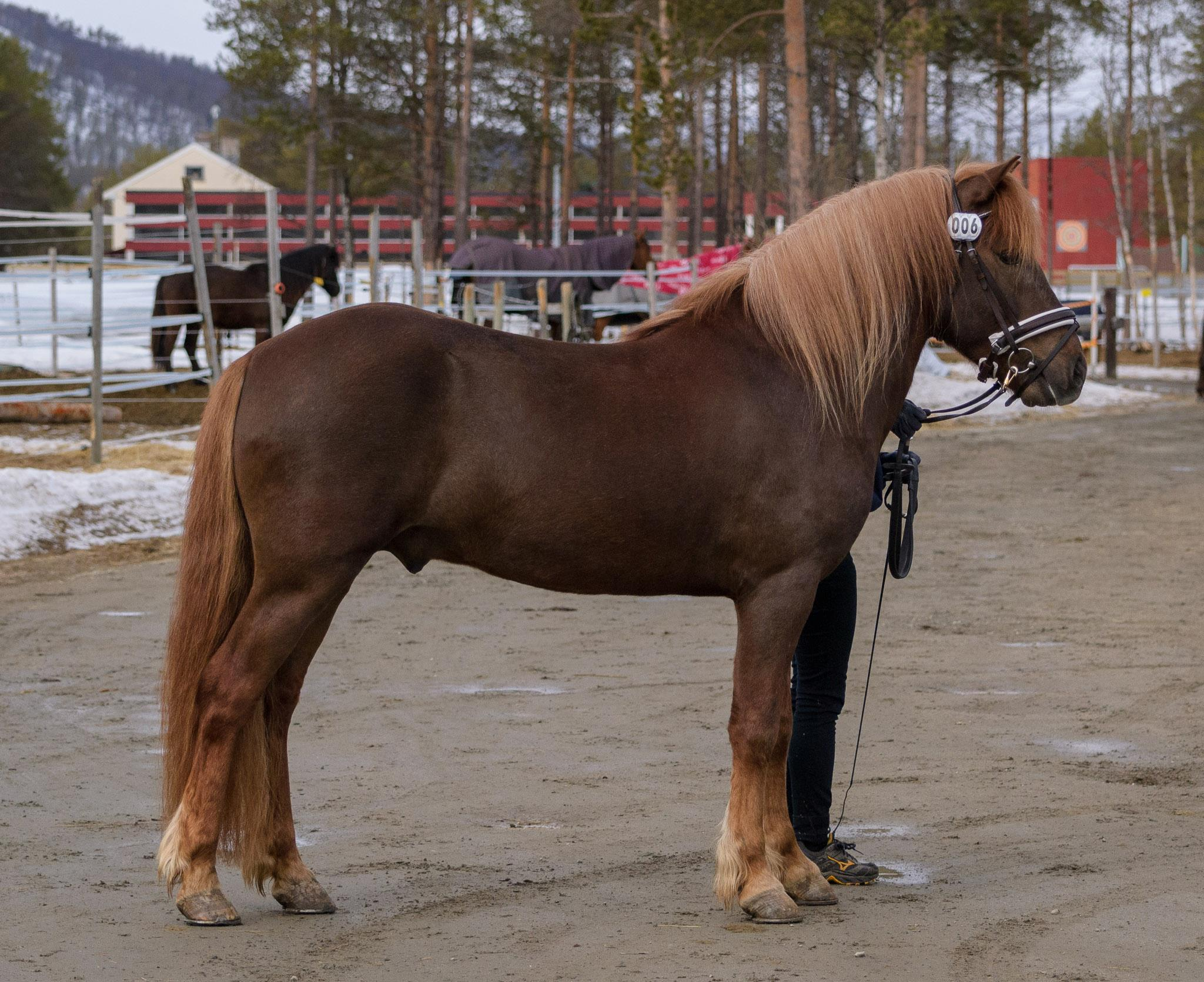 Bjørkemåne